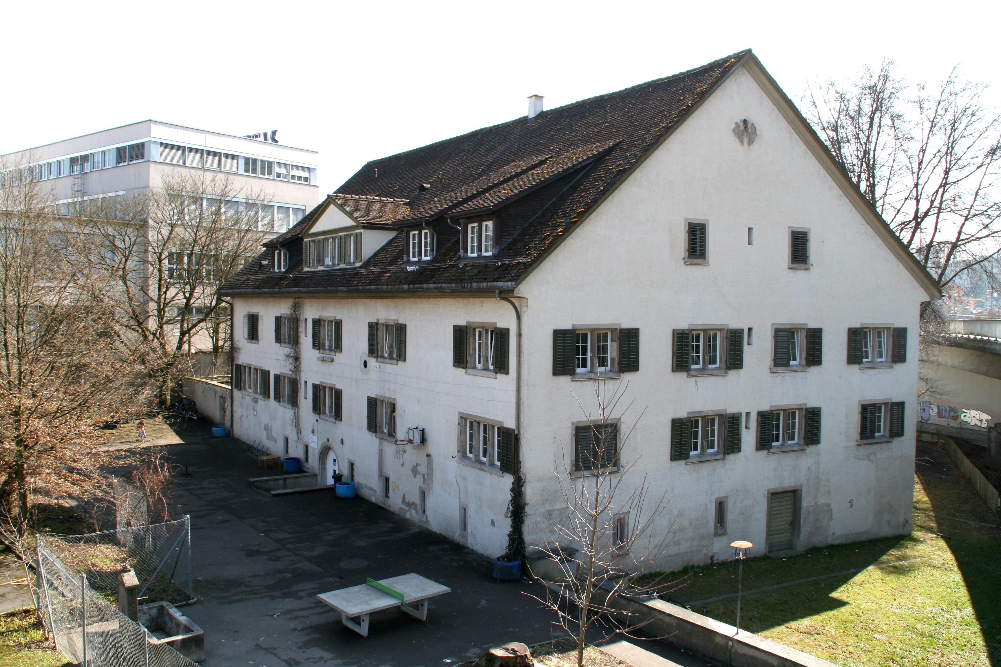 Kloster Töss ehemaliges Mühlegebäude, Ansicht von NW